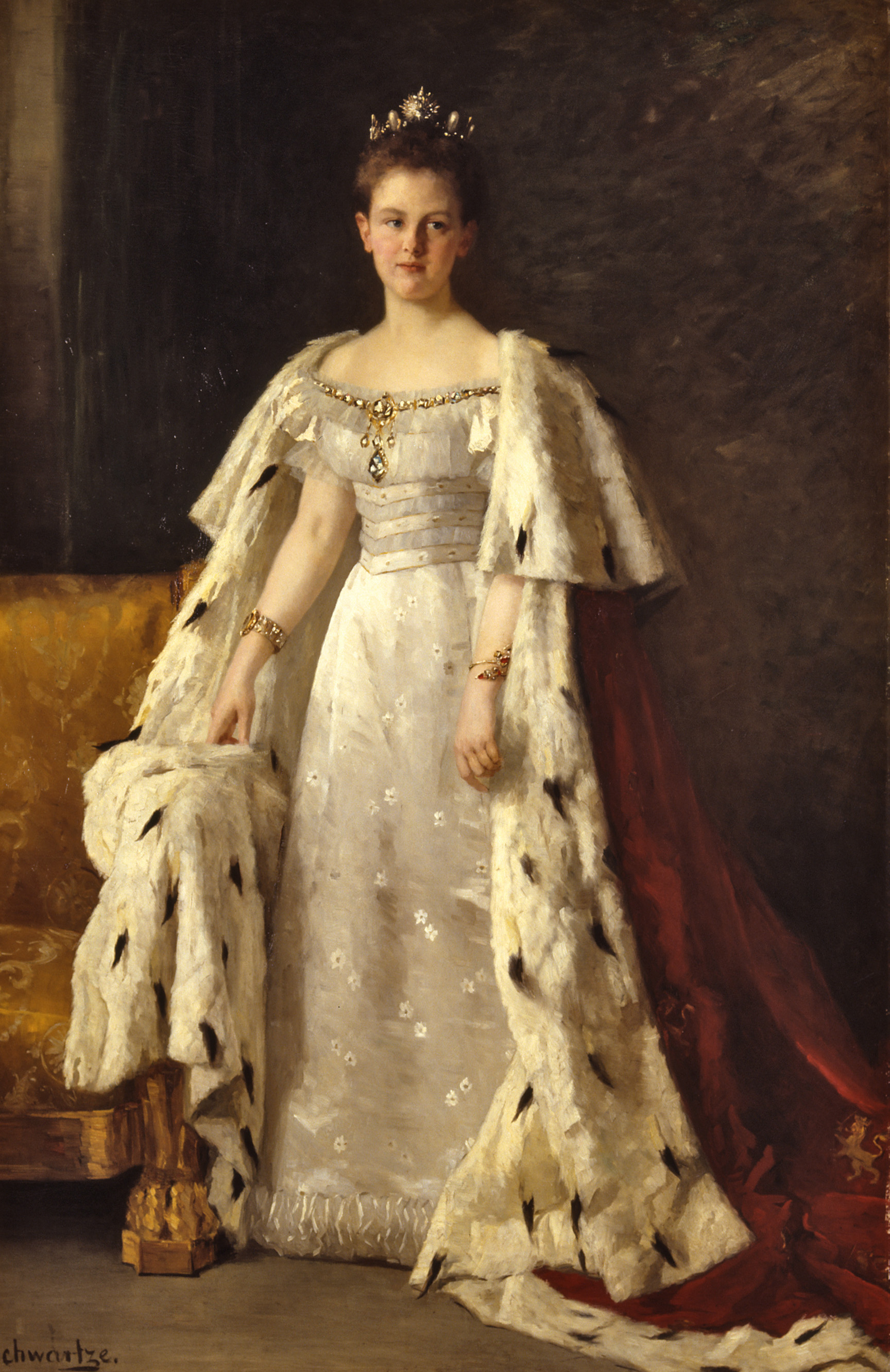 Queen Wilhelmina